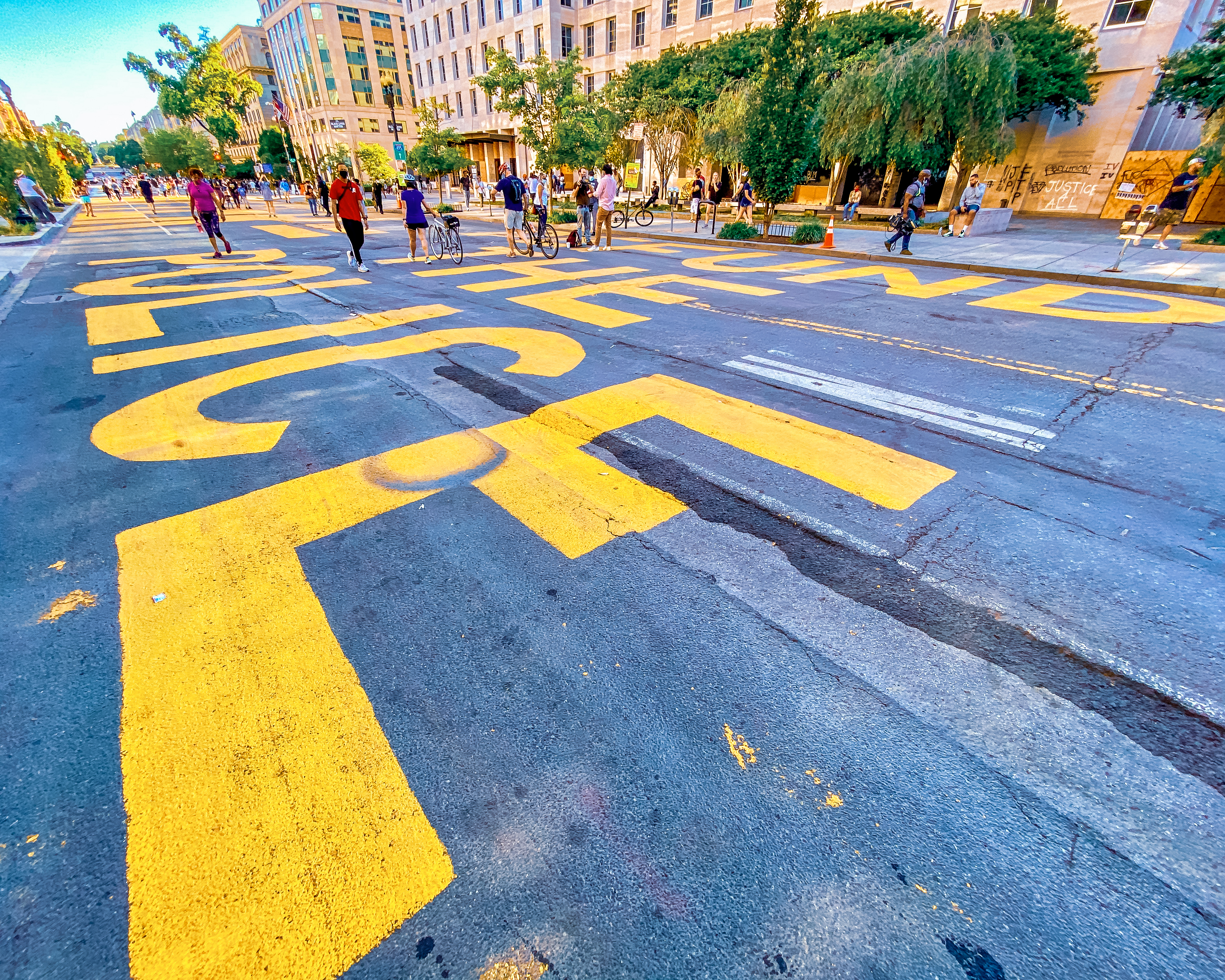 2020.06.07 Black Lives Matter Plaza, Washington, DC USA